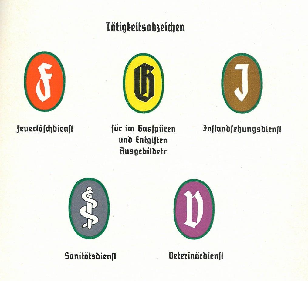 farbige Abbildungen der SHD-Dienstbekleidung sowie Rang- und Tätigkeitsabzeichen